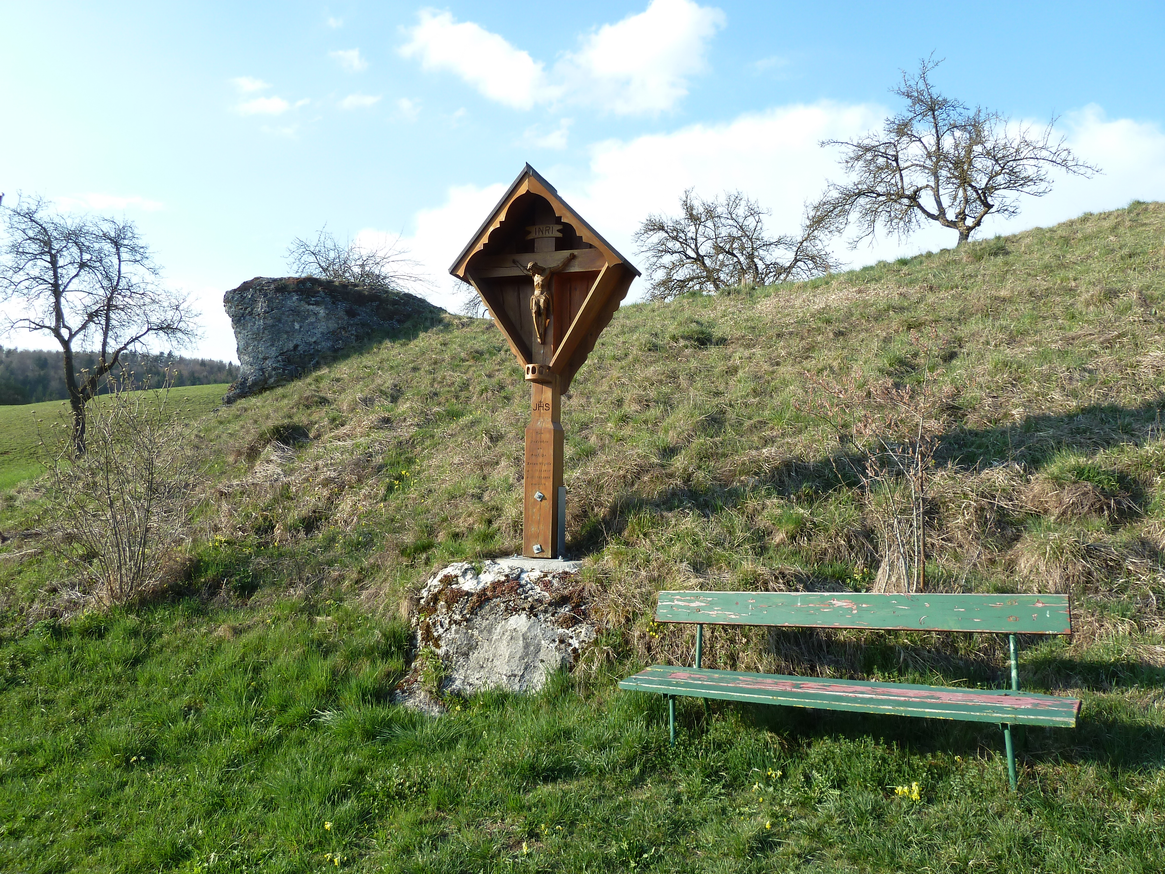 Der Storzenstein an der Straße von Vilsingen nach Dietfurt (beide Inzigkofen). Dies war der Lieblingsplatz von Anton Vögtle (1910–1996), an dem seine Verwandten im Jahr 2010 ein Gedenkkreuz errichtet haben.